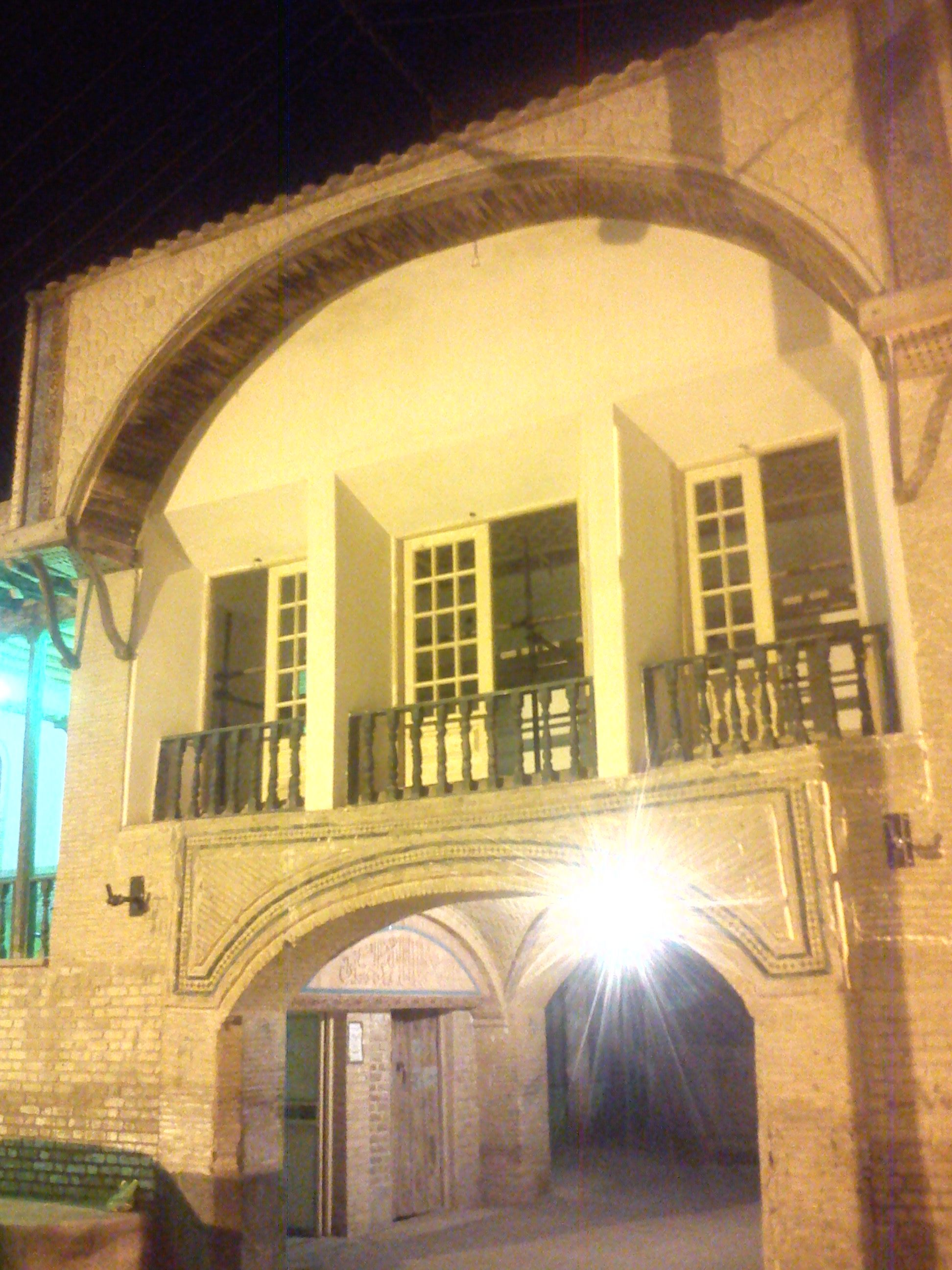 تکیه زنجیری شاهرود (تکیه بازار)از یادگاران دوره قاجار در شاهرود می باشد. عکس محمد رضائیان